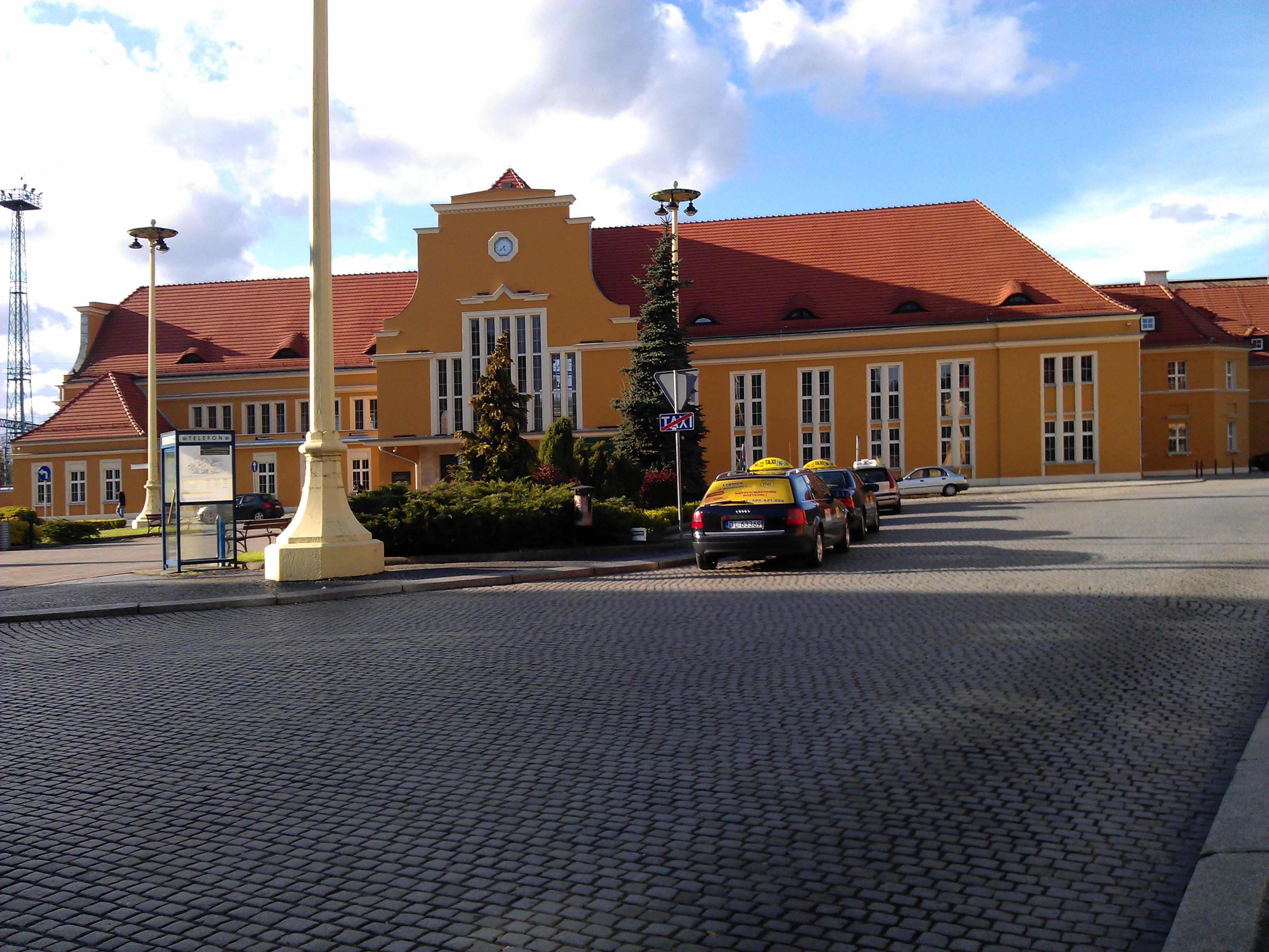 Dworzec PKP w Legnicy po remoncie.